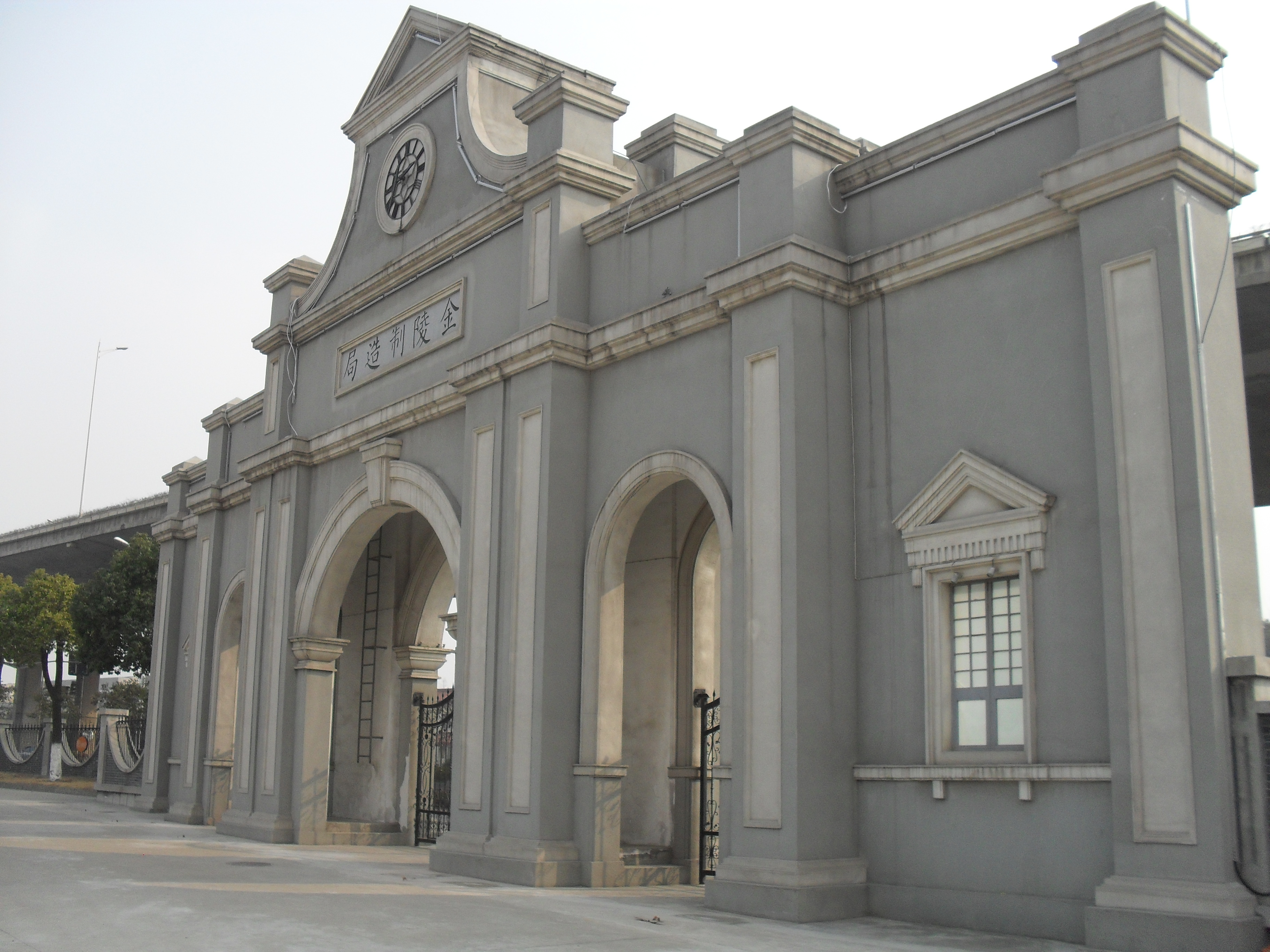 南京晨光厂原60兵工厂老厂大门〔复建〕